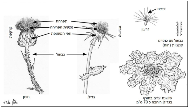 חלקי הקוץ